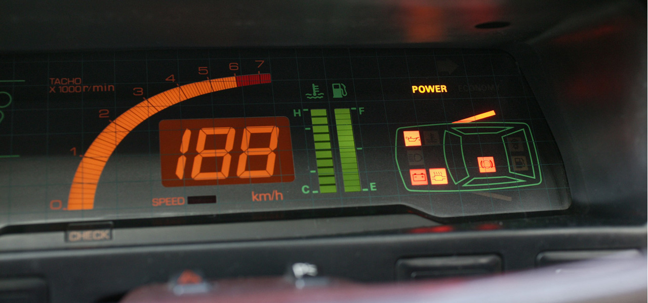 Mitsubishi Cordia Digital meter panel